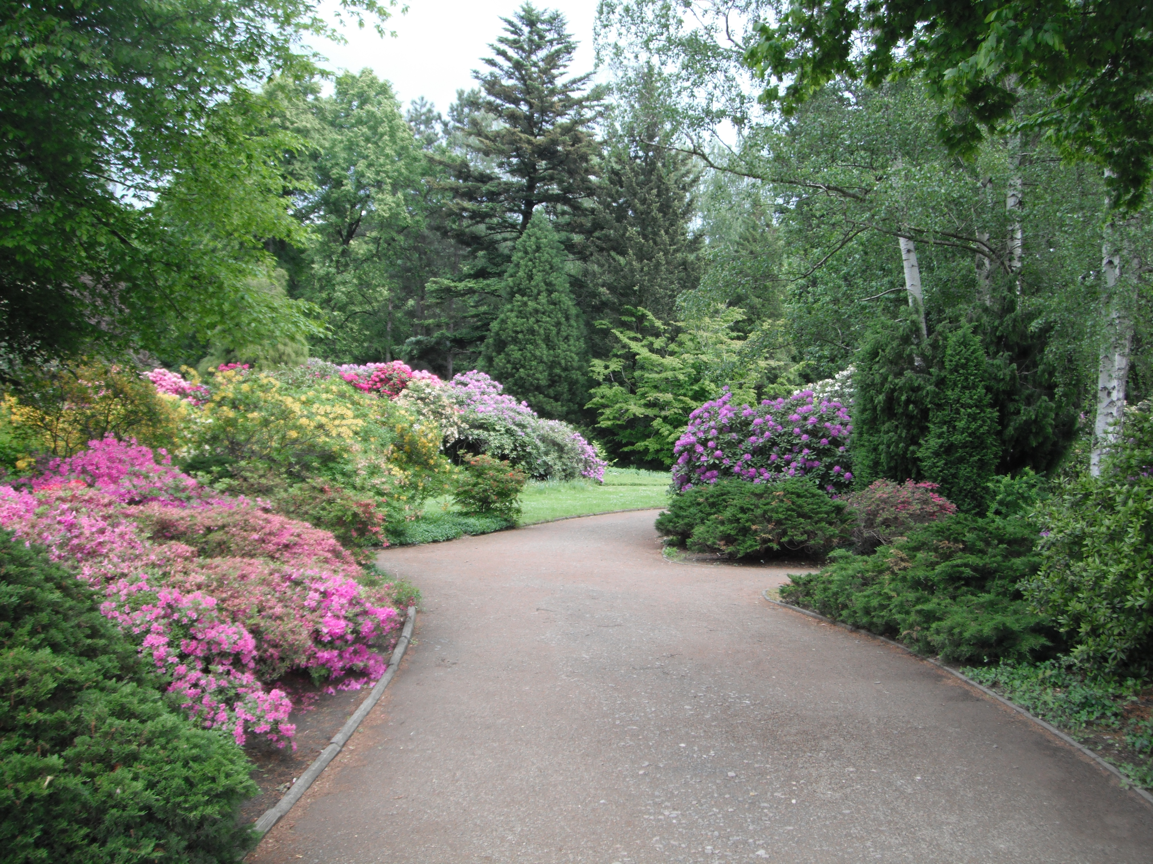 Blumen im Großen Garten Dresden.